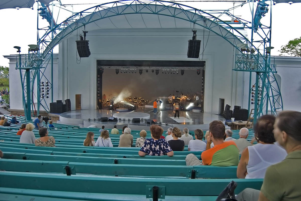 Репетиция в летния театър в морската градина на Бургас.